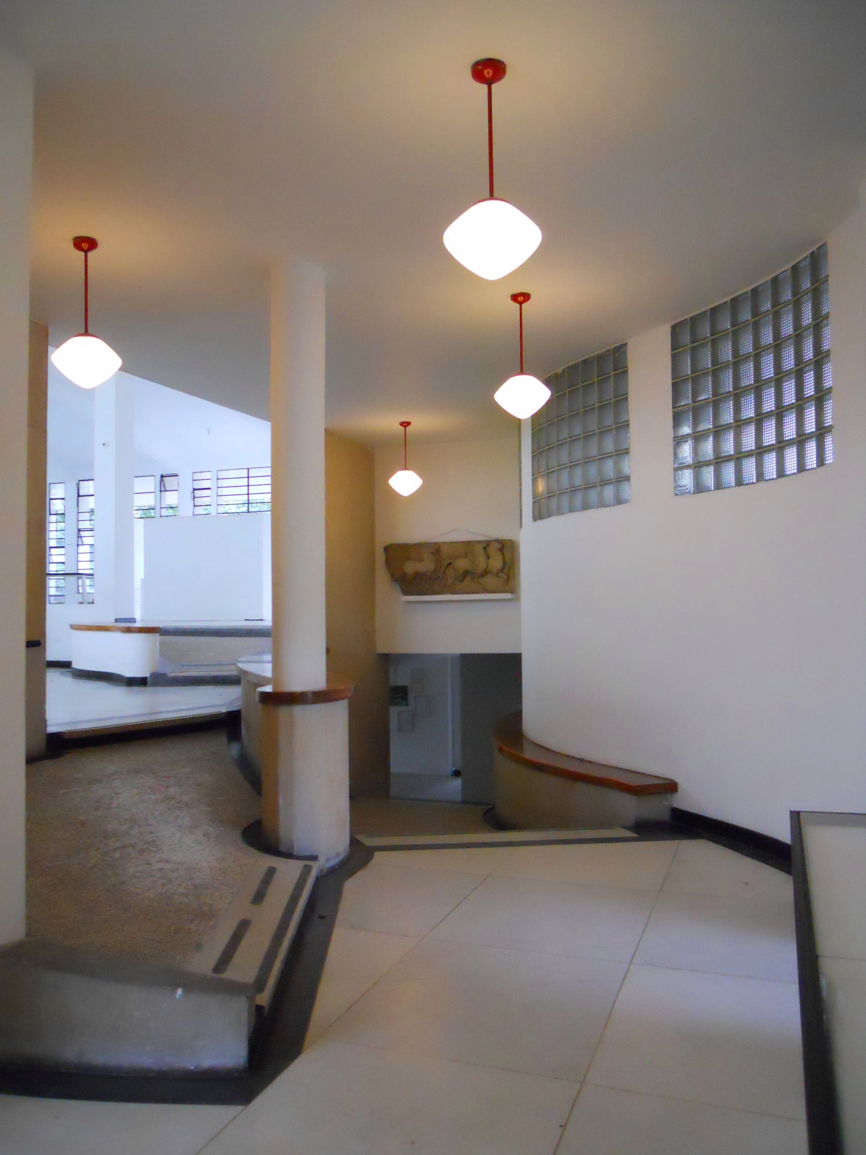 Interior de el Museo de Arquitectura Leopold Rother, en la sede Bogotá de la Universidad Nacional de colombia.